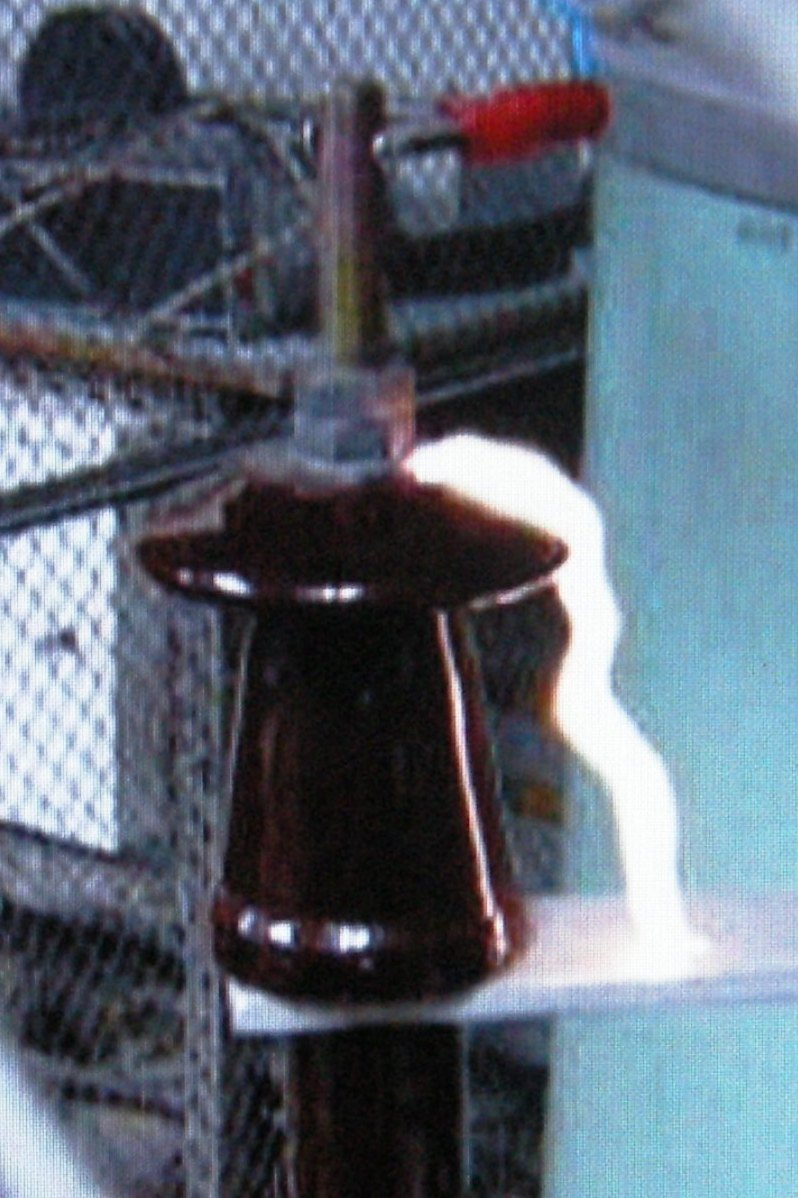 Wyładowanie ślizgowe na powierzchni izolatora w powietrzu